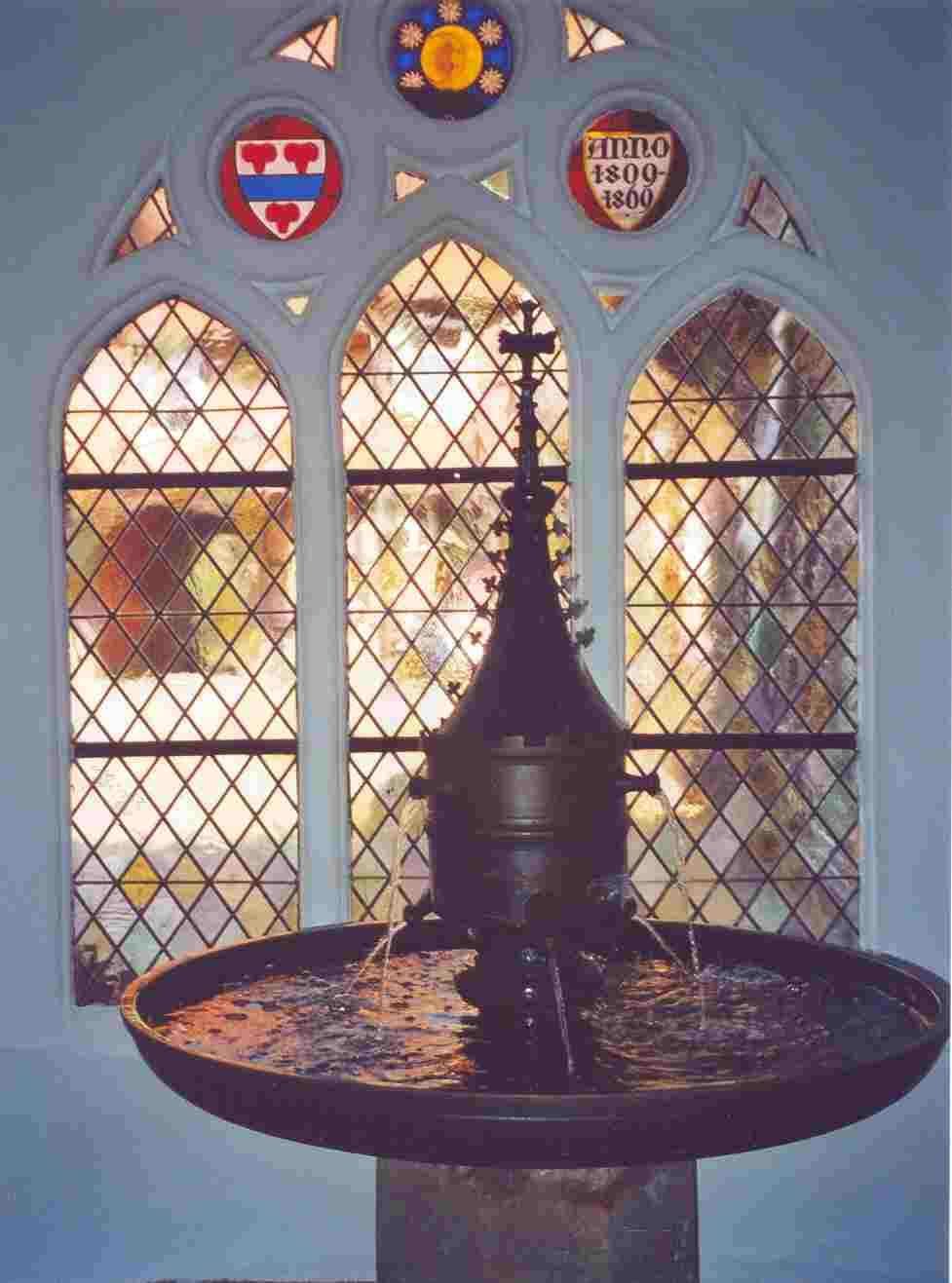 Der "Handstein" genannte Laufbrunnen in der Eingangshalle.